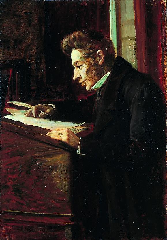 Portrait of Søren Kierkegaard